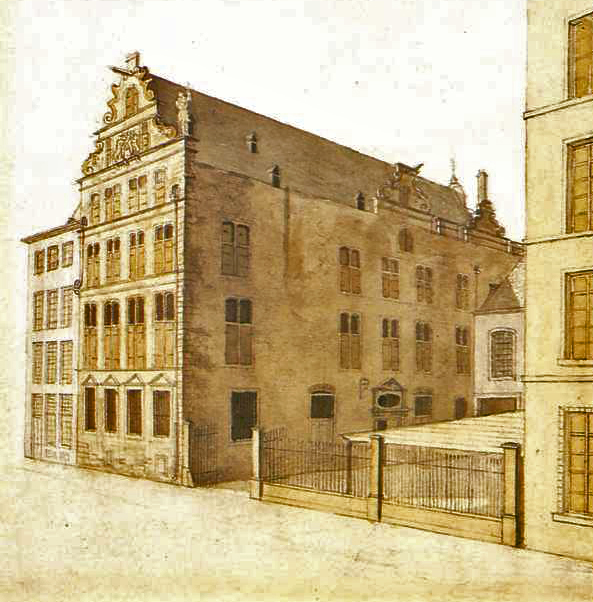 Haus der Fassbinderzunft, Köln. Das Gebäude am Filzengraben wurde um 1539 errichtet